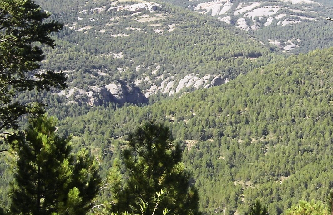 El cingle de Sant Julià, al torrent de Junyent, Canalda (Odèn)